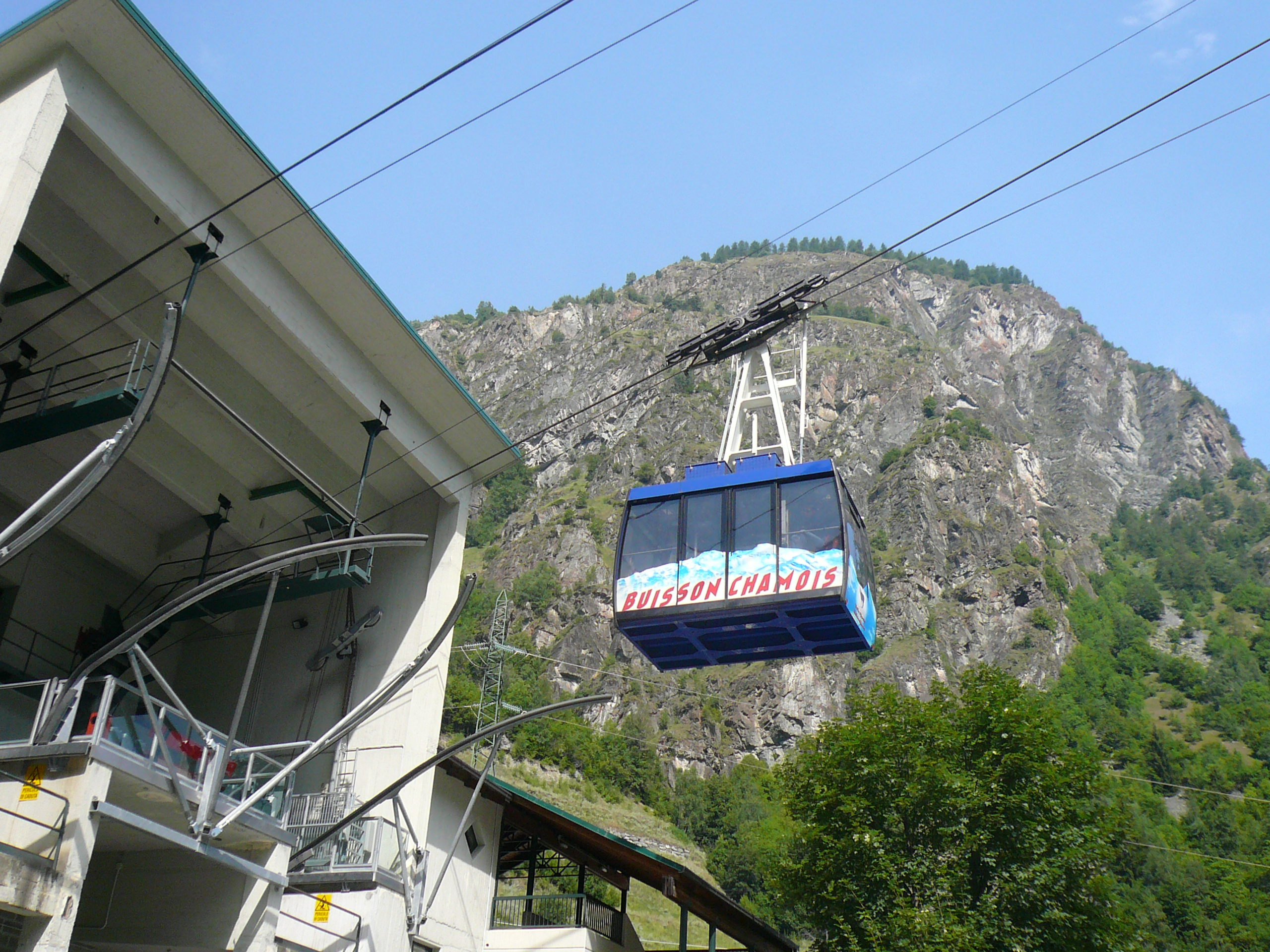 Téléphérique pour le transport de voyageurs